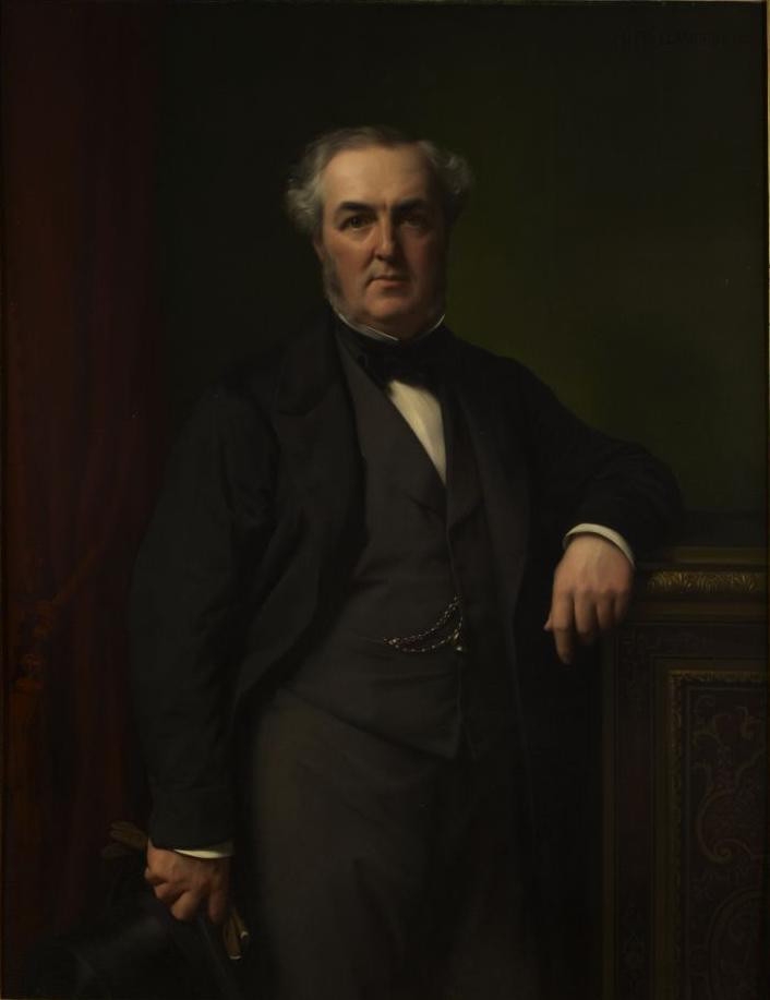 "Auguste Casimir-Perier, député de l'Aube, ministre de Thiers".